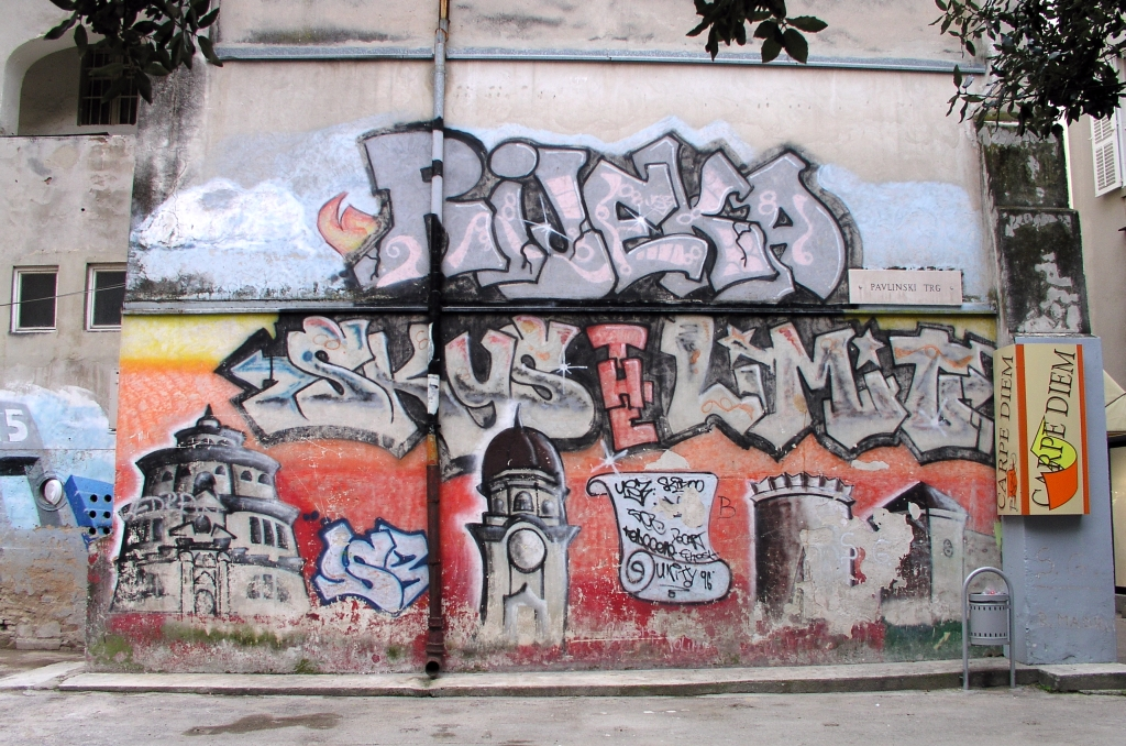 grafiti u Rijeci (šporki Stari grad)